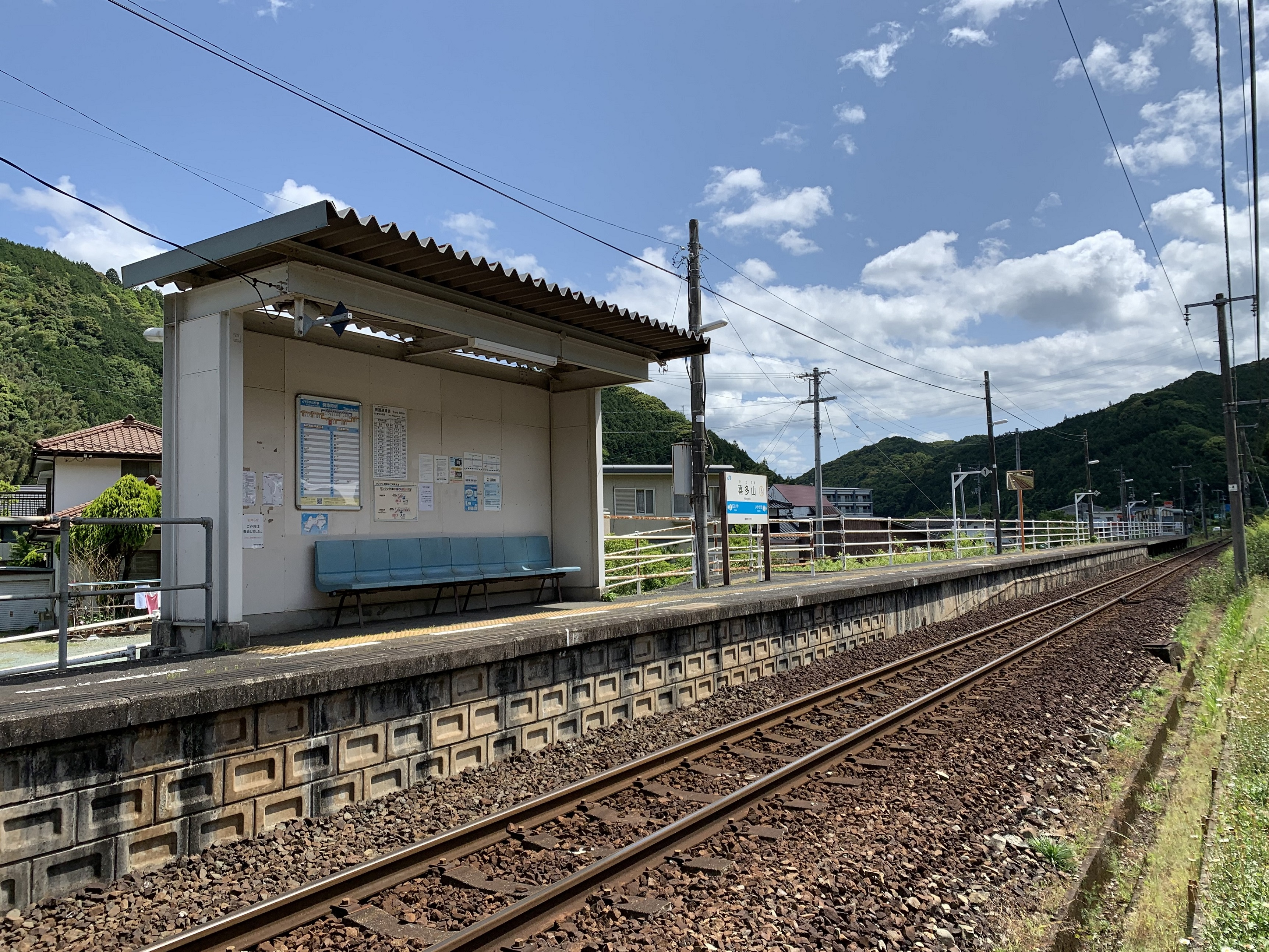 愛媛県大洲市 JR四国 予讃線 喜多山駅